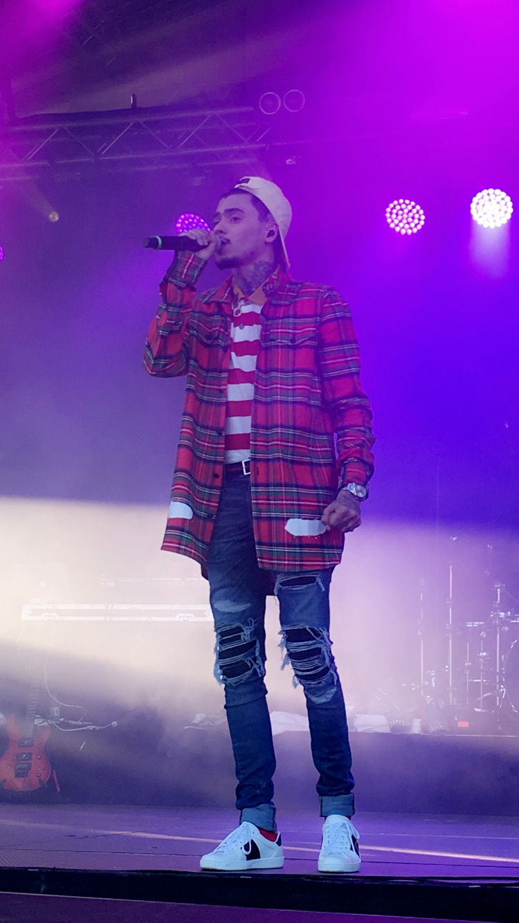 Mikael Gabriel esiintymässä Saaristo-Open-festivaaleilla kesällä 2017.